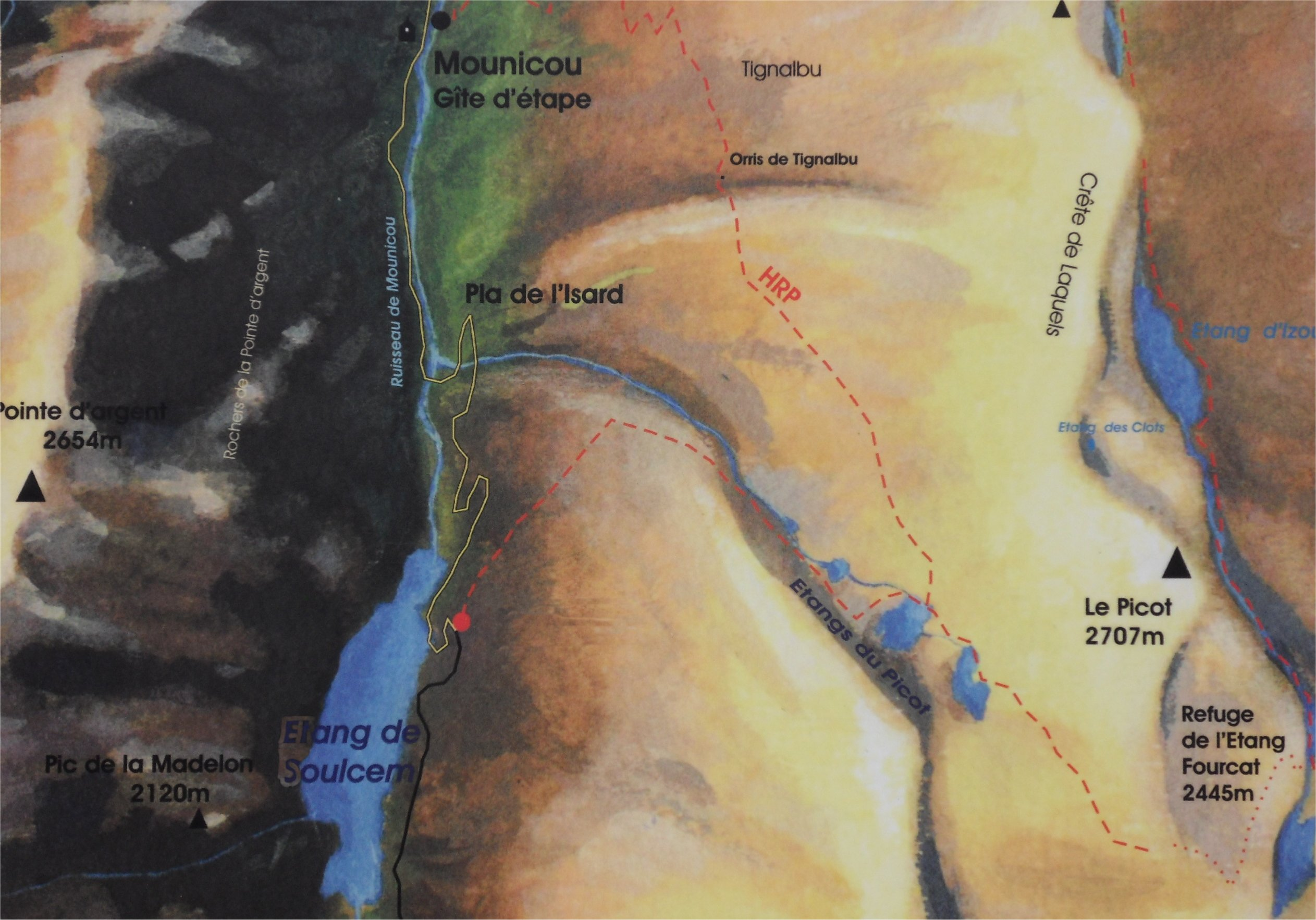 Itinéraire de randonnée vers les étangs du Picots depuis le barrage de Soulcem dans la vallée de Vicdessos